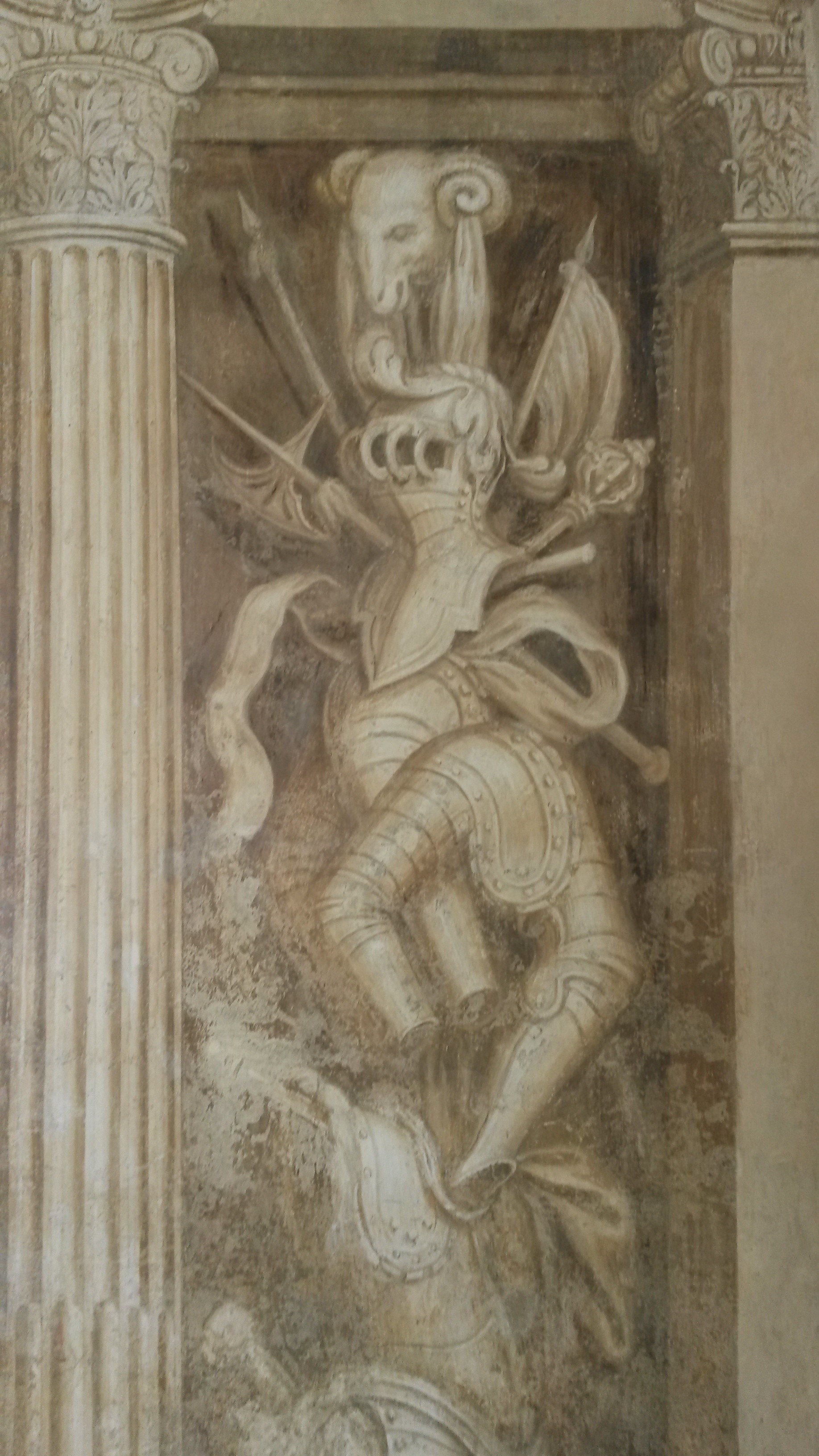 Paolo Farinati, "Panoplia" (Pannello con armi, armature e trofei militari), 1590 circa, affresco (restaurato nel 2016).